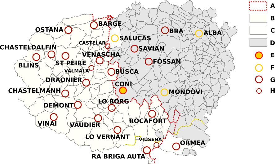 Mapa istorica de la província de Coni amb sas comunas